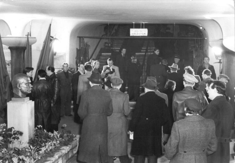 Berlin, Friedrichstadtpalast, Foyer Zentralbild Sturm9.3.1954 Festliche Uraufführung des Films Ernst Thälmann Sohn seiner Klasse. Am 9. März 1954 wurde im Berliner Friedrichstadtpalast der große Defa-Farbfilm Ernst Thälmann - Sohn seiner Klasse in einer festlichen Premiere uraufgeführt. UBz: Die Premierenbesucher im Foyer des Friedrichstadtpalastes.